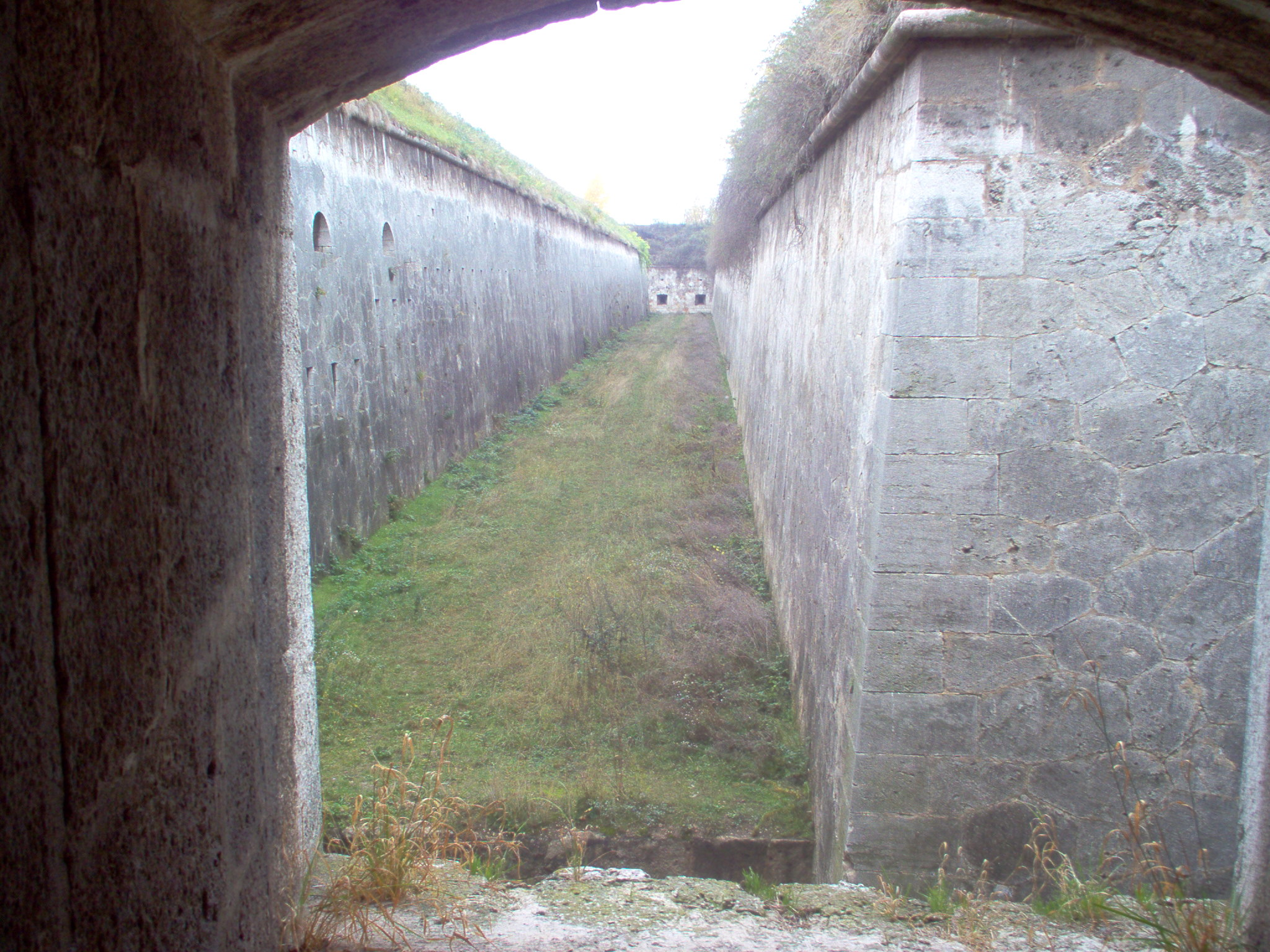 Komárom, Monostori erőd